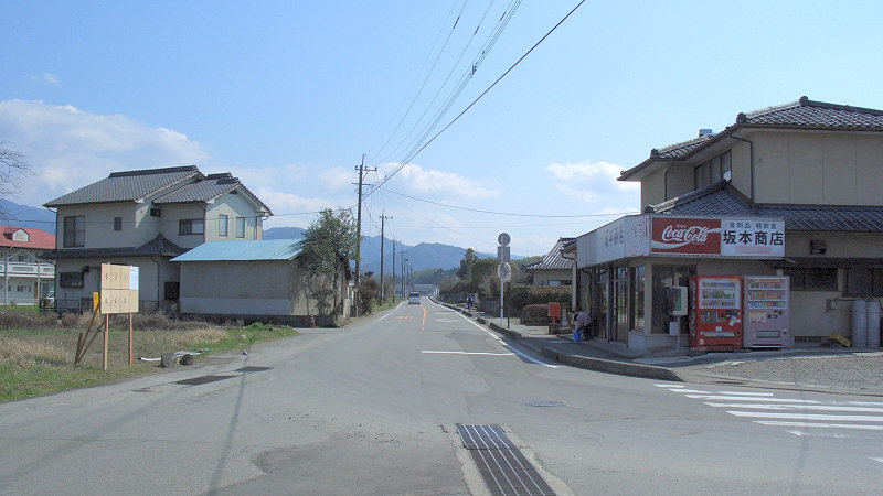 くま川鉄道湯前線ja:肥後西村駅 駅周辺 駅前広場から南側を見る。 写真中央の道を進むとja:球磨商業高校、更にja:国道219号に突き当たる。 撮影者/著者/著作権保有者 : MK Products (本人がアップロード) 撮影日 : 2007/03/14 肥後西村駅用にアップロードした画像です。良い画像があれば別の画像に変えてください。